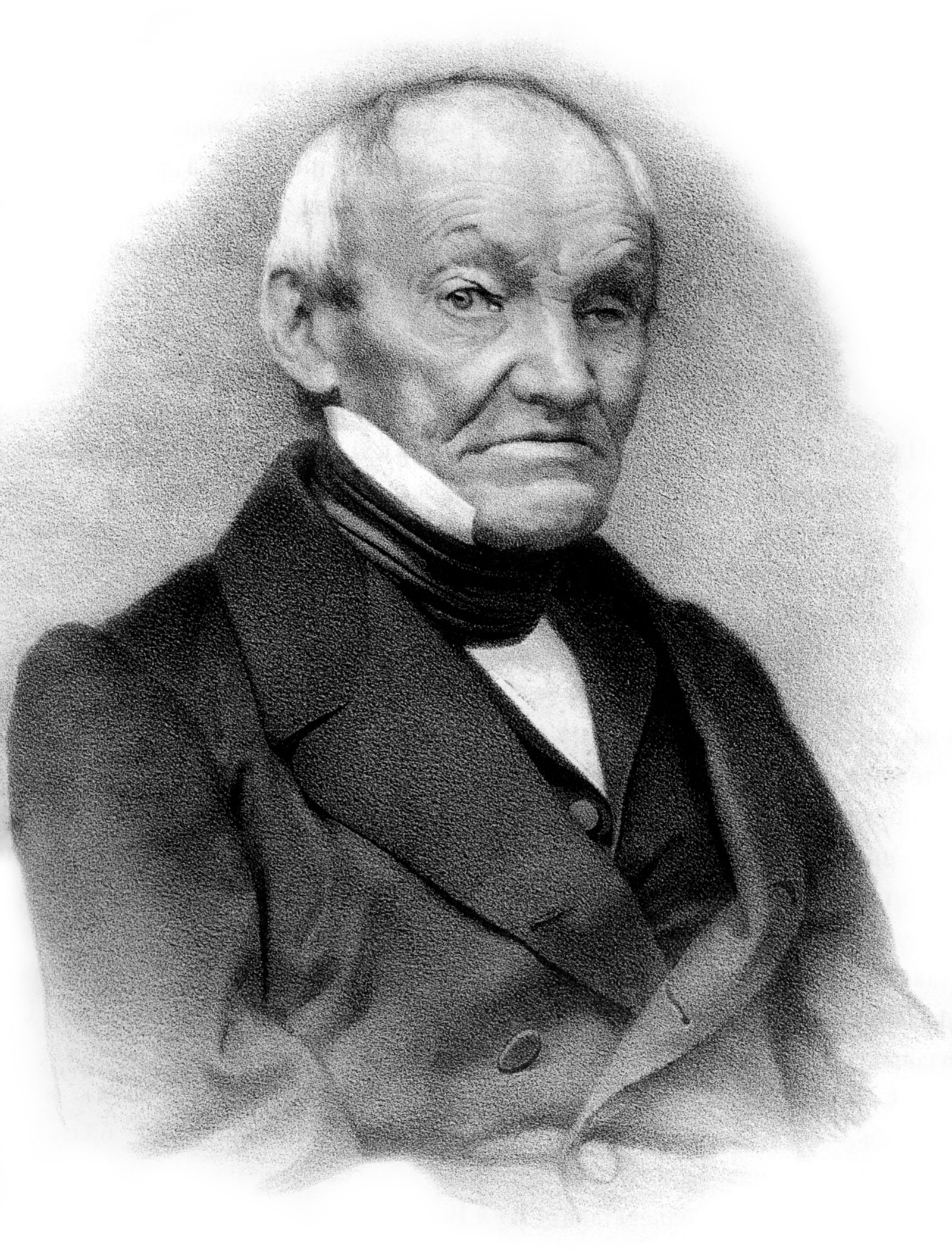 P. KOEPPEN. Лит. А. Мюнстера, СПБ. Imp. Lith. A. Munster (Editeur)